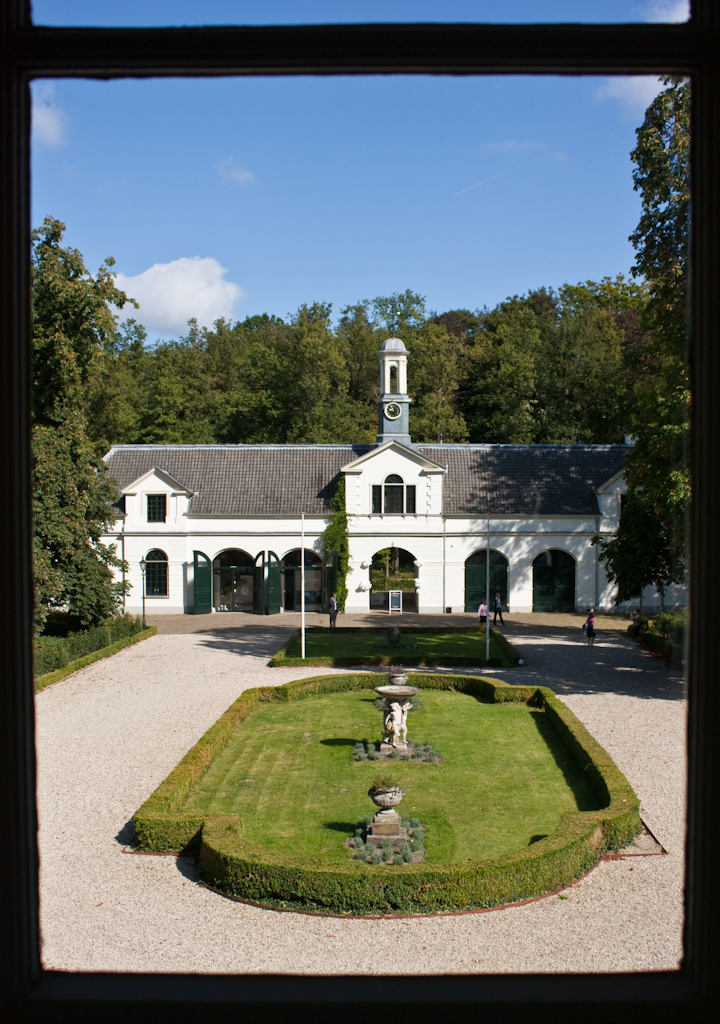 Zicht op een deel van het koetshuis van het Kasteel van Staverden